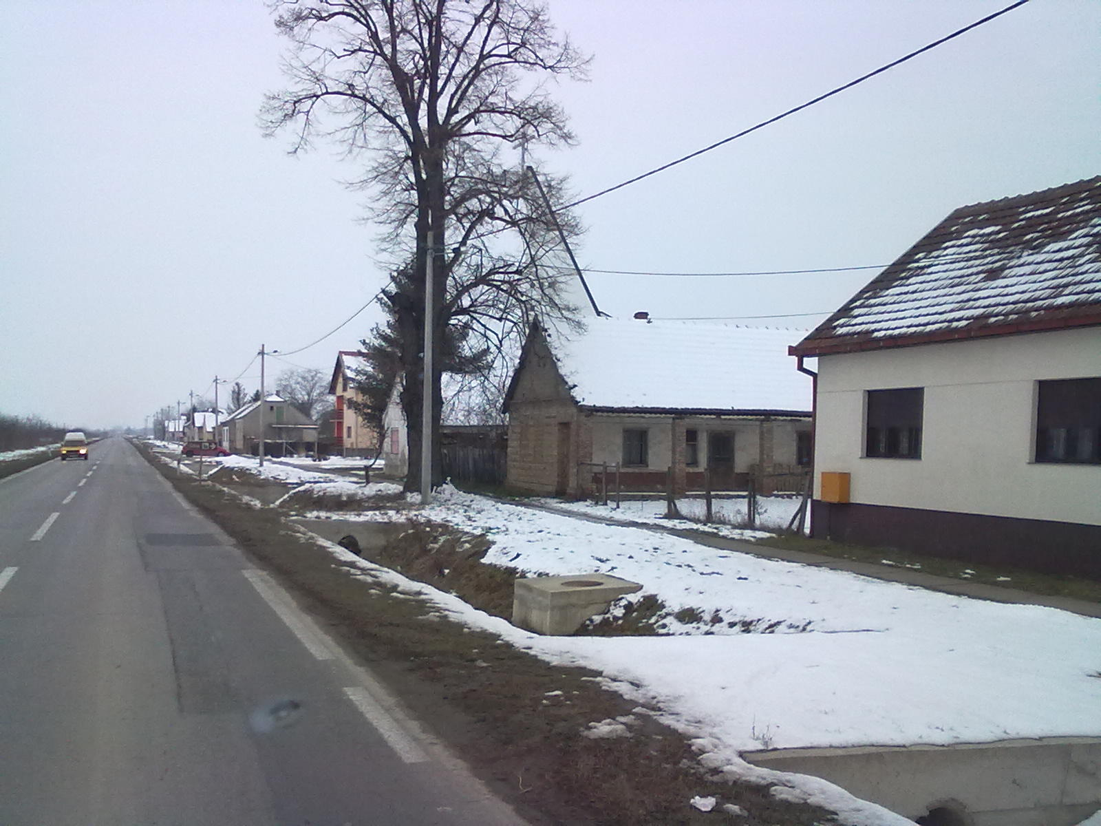 31222, Samatovci, Croatia